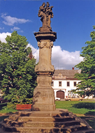 Barokní socha Sv. Anny Samotřetí (1737) na náměstí v Nechanicích, Nechanice, district Hradec Králové Czech Republic autor: Prazak Date: 6. 6. 2004